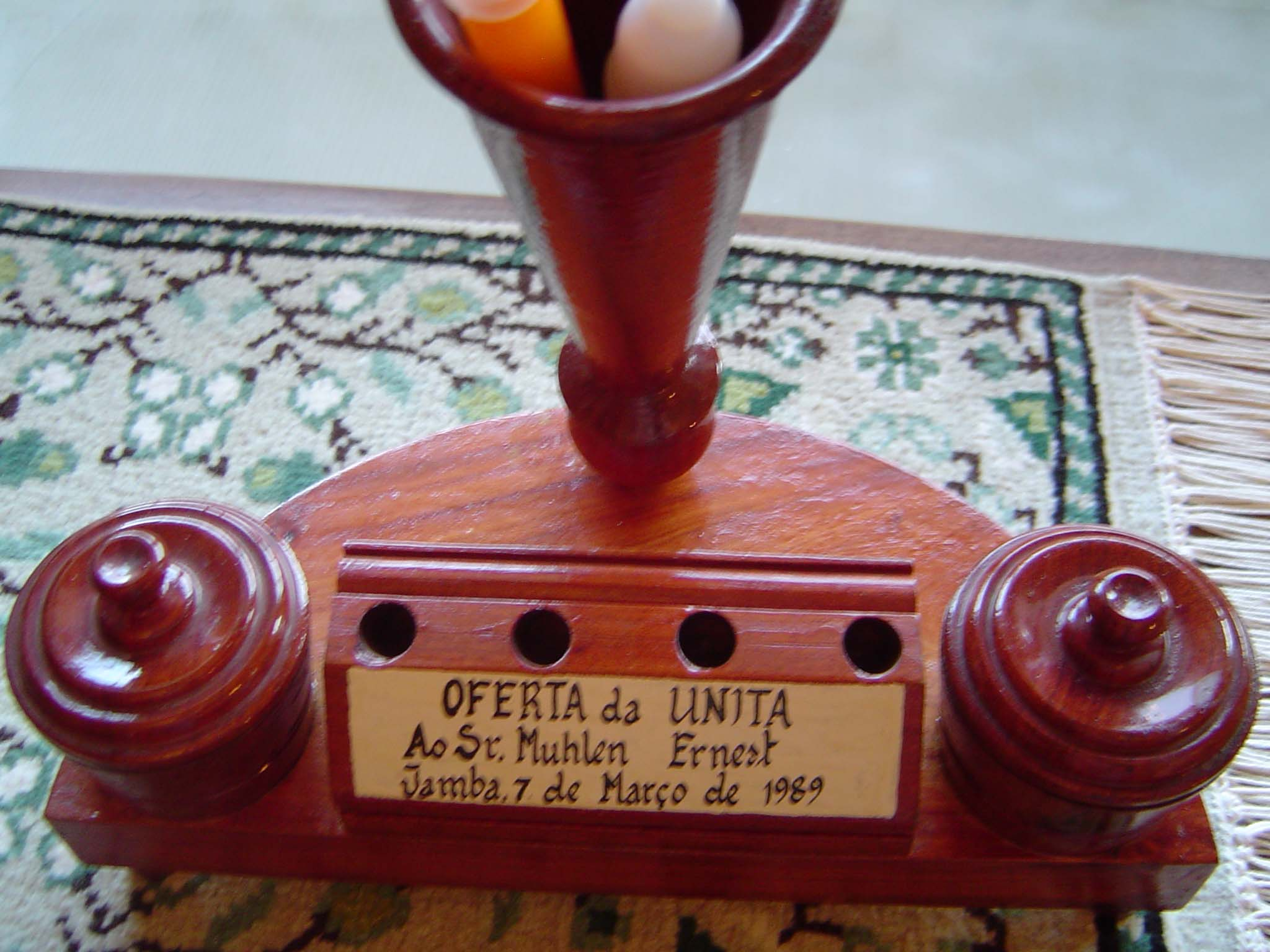 Souvenir vun der UNITA un hir Gäscht, an den Ateliere vum Haaptquartéier selwer gemaach.